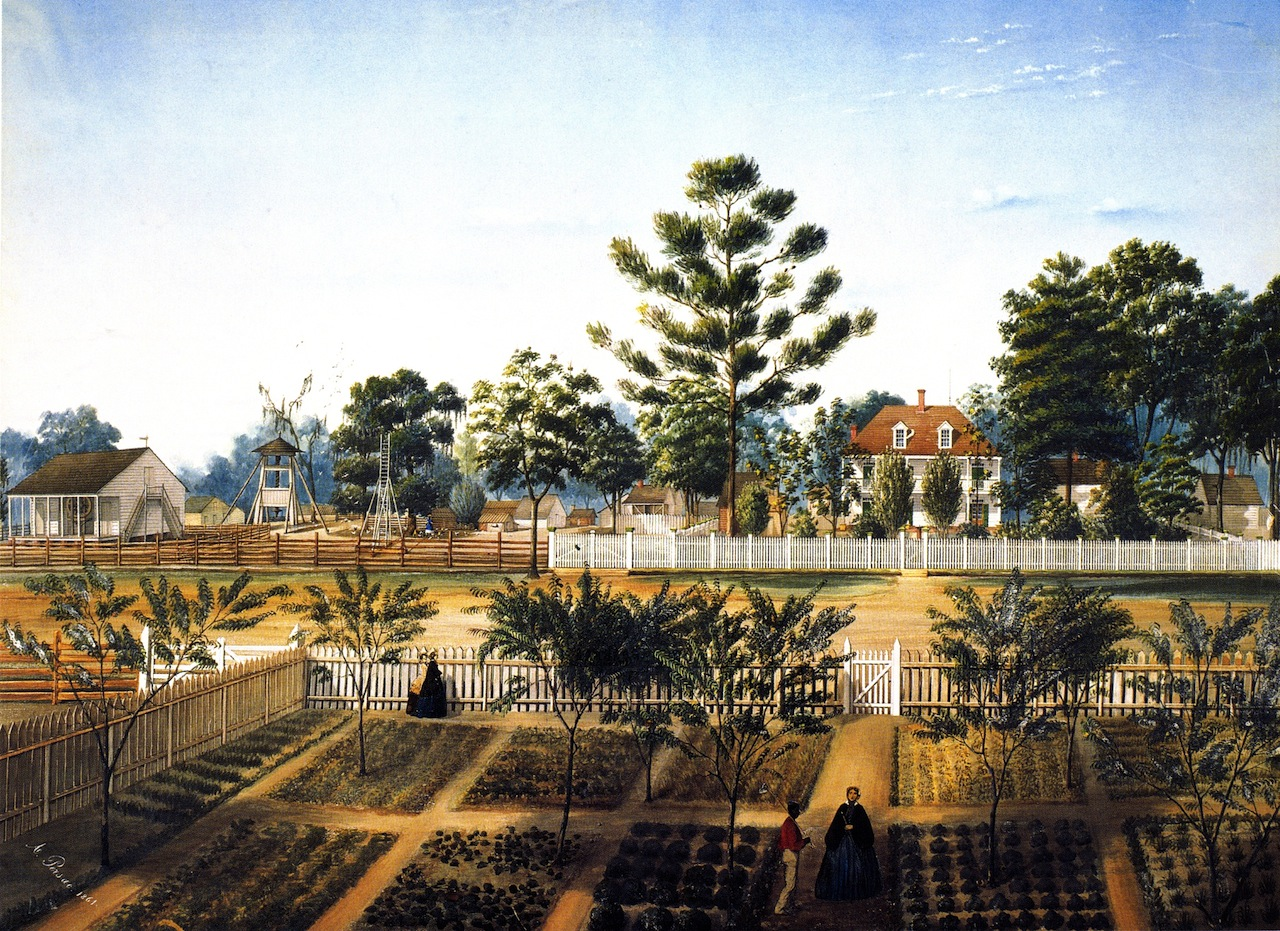 Bois de Fleche Planatation, Louisiana, 1861